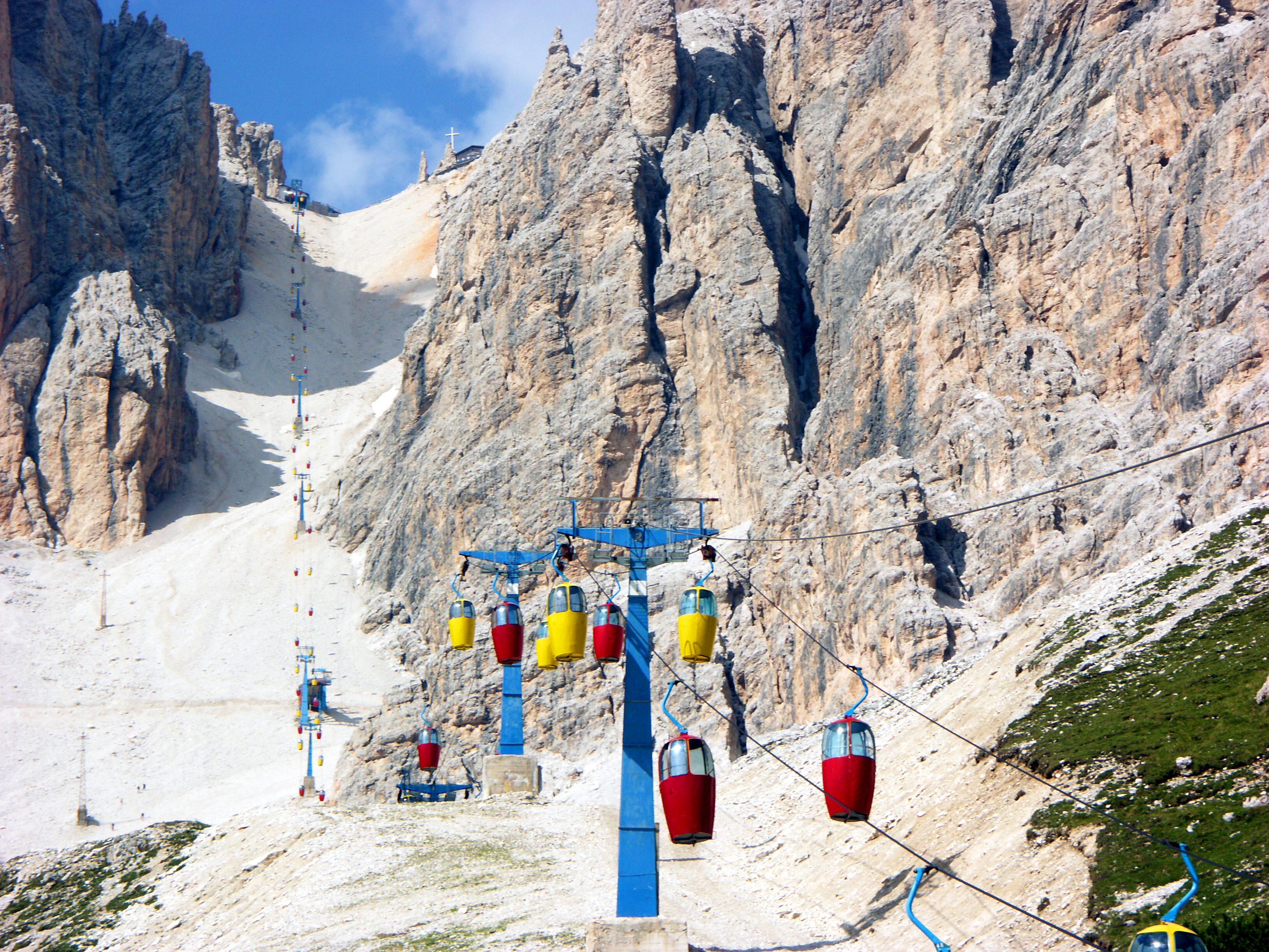 Italien, Belluno, Dolomiten, Monte Cristallo, Korblift zur Forcella Staunies, rechts in der Scharte das Rifugio Lorenzi